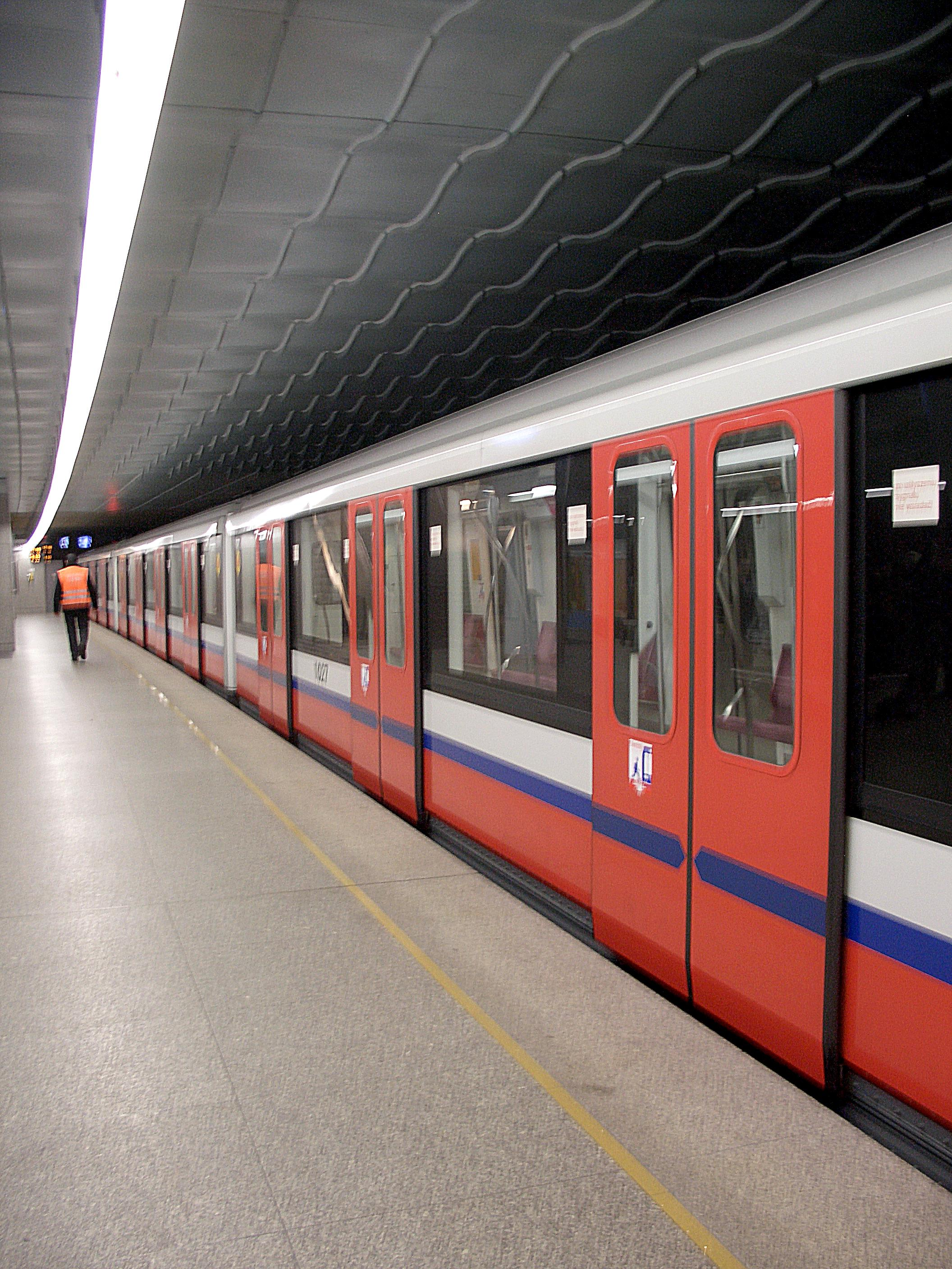 Skład "Metropolis" firmy Alstom, Metro Warszawskie.